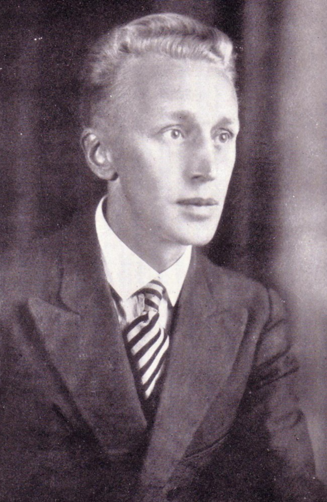 Willem Erlank.